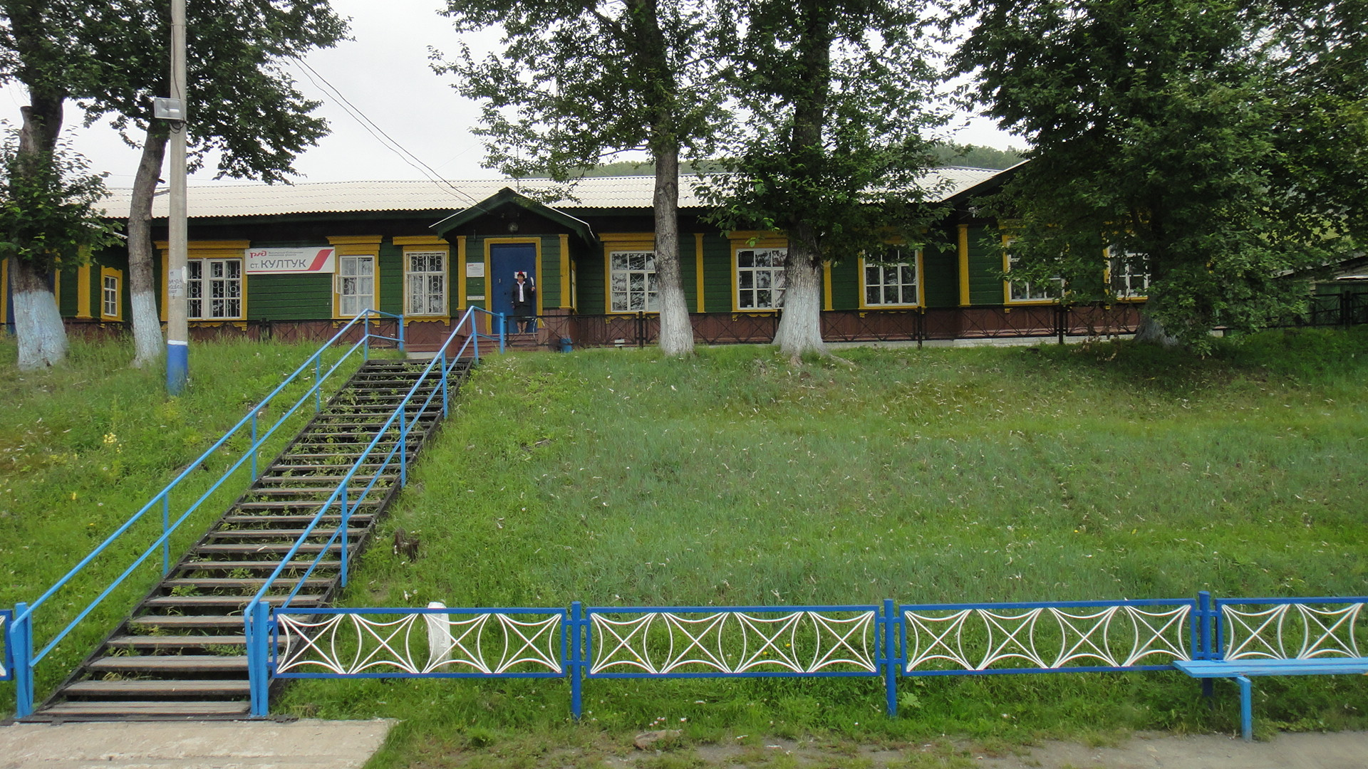 железнодорожная станция Кутлук